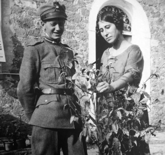 Biagio Marini e Pina Marini a Pescia tra il 1912 e il 19118